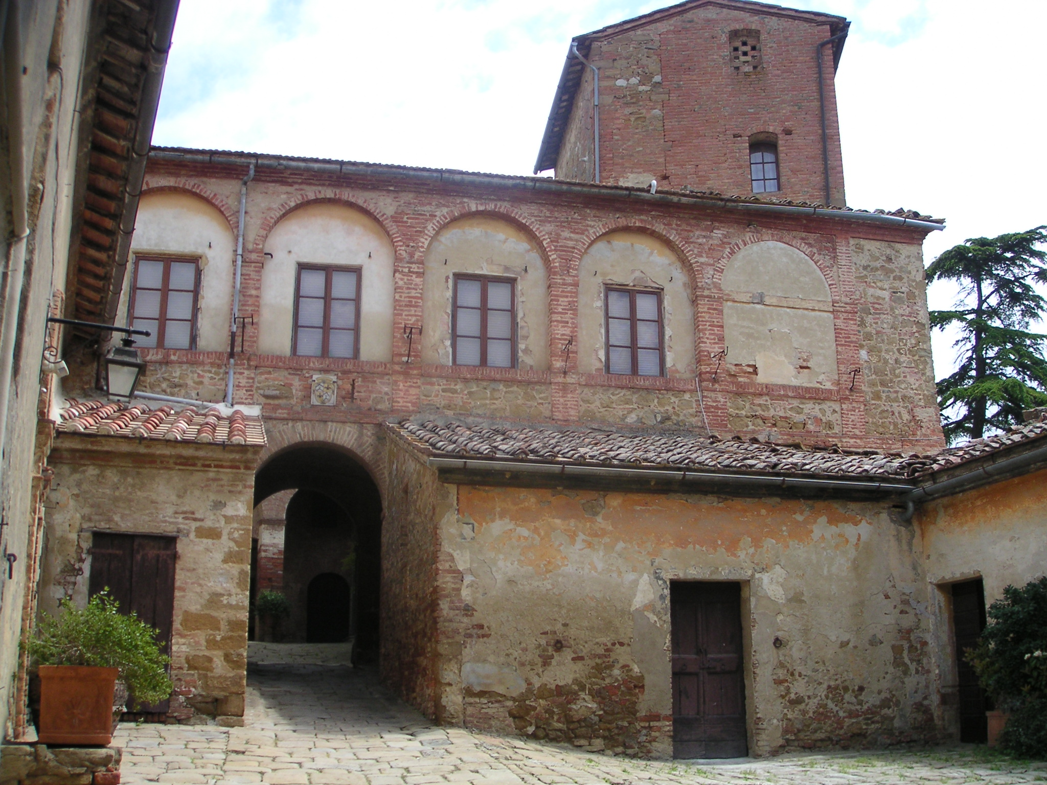 Il primo cortile della Grancia di Santa Maria della Scala in Montisi, provincia di Siena, con la Loggia in secondo piano.